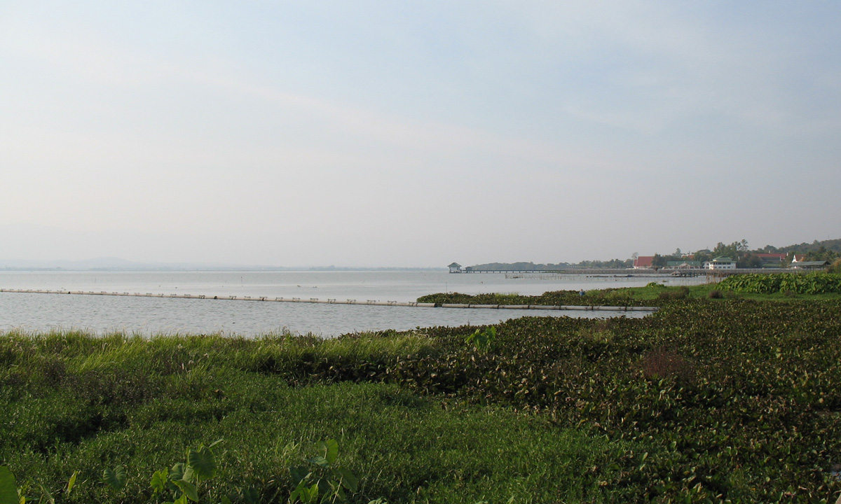 Phayao Lake(Kwan Phayao), Phayao Province.